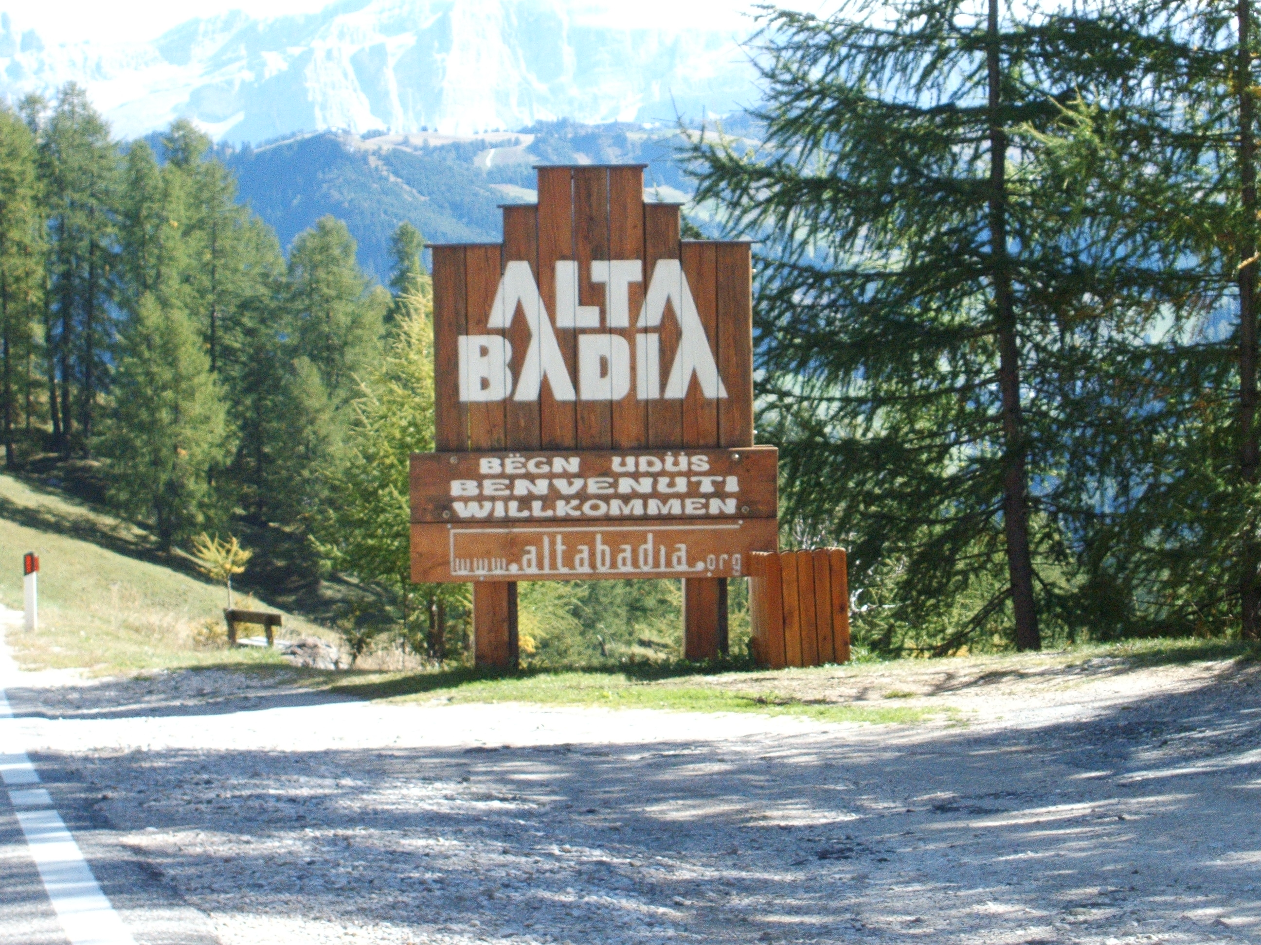 Alta badia, Alto Adige, Italia.